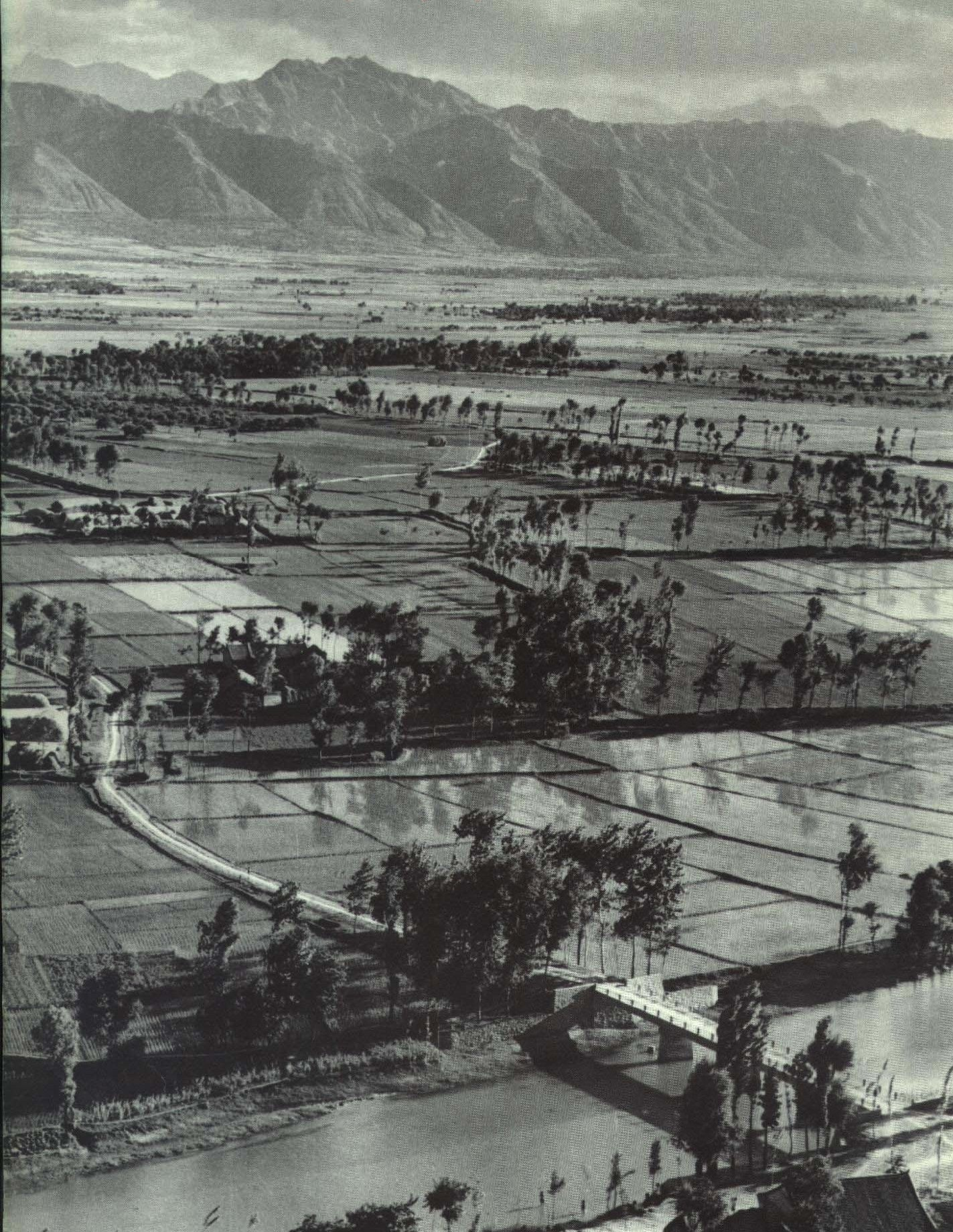 1965-01 西安蛤蟆滩